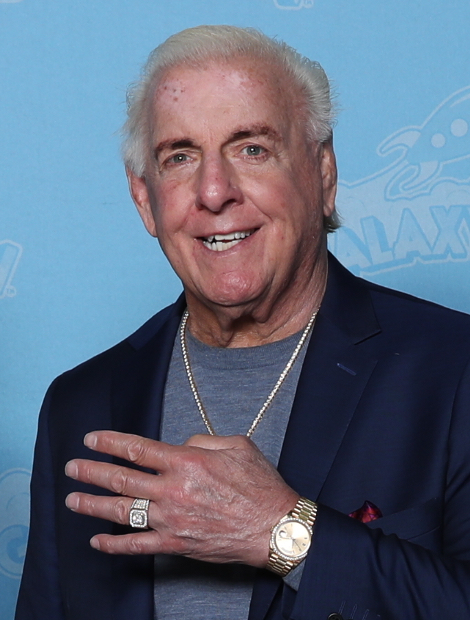 Ric Flair at GalaxyCon Louisville in 2019